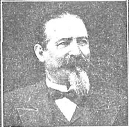 Retrato de Pedro Martínez Luna.